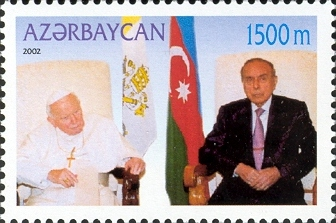 Azeri postage stamp